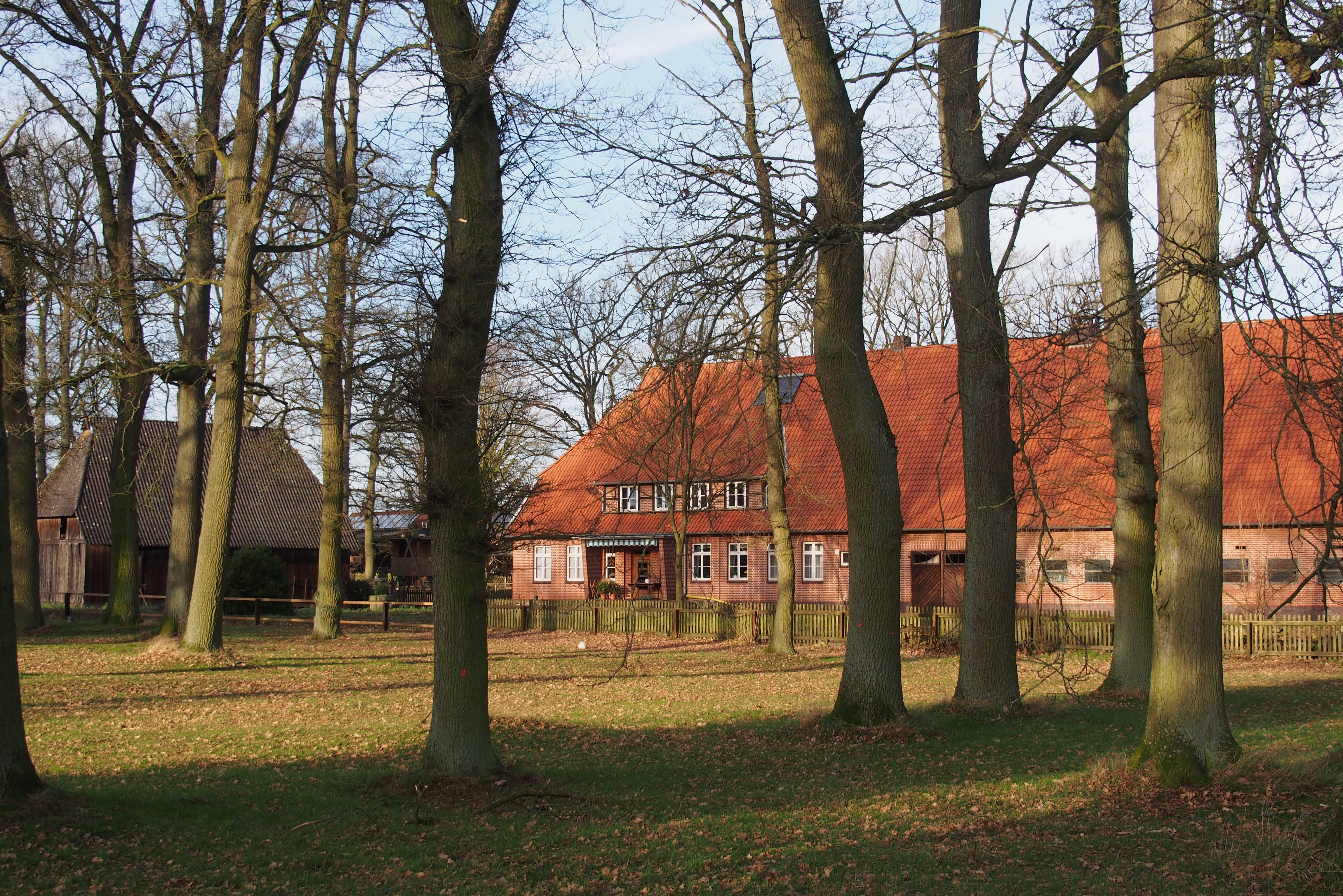 Bauernhof in Hermannsburg OT. Baven, Niedersachsen